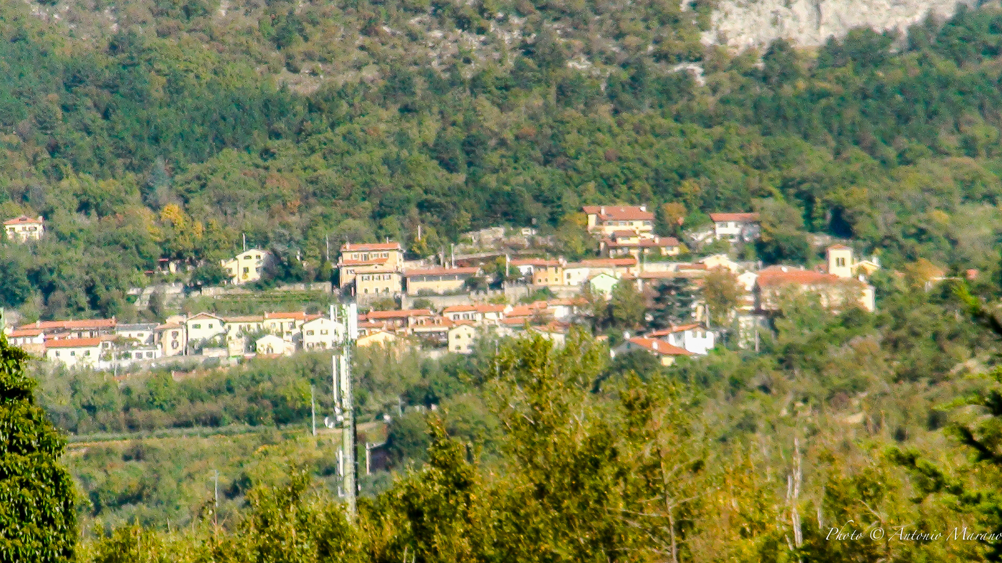 San Dorligo della Valle - Friuli Venezia Giulia